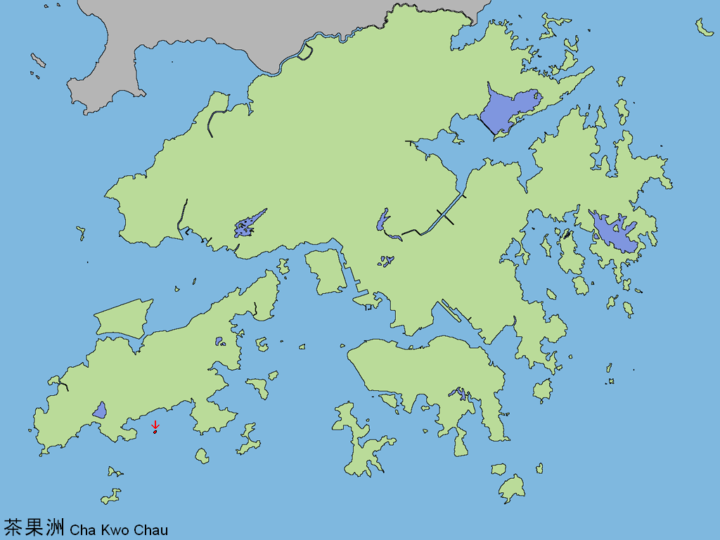 中文（香港）: 茶果洲。